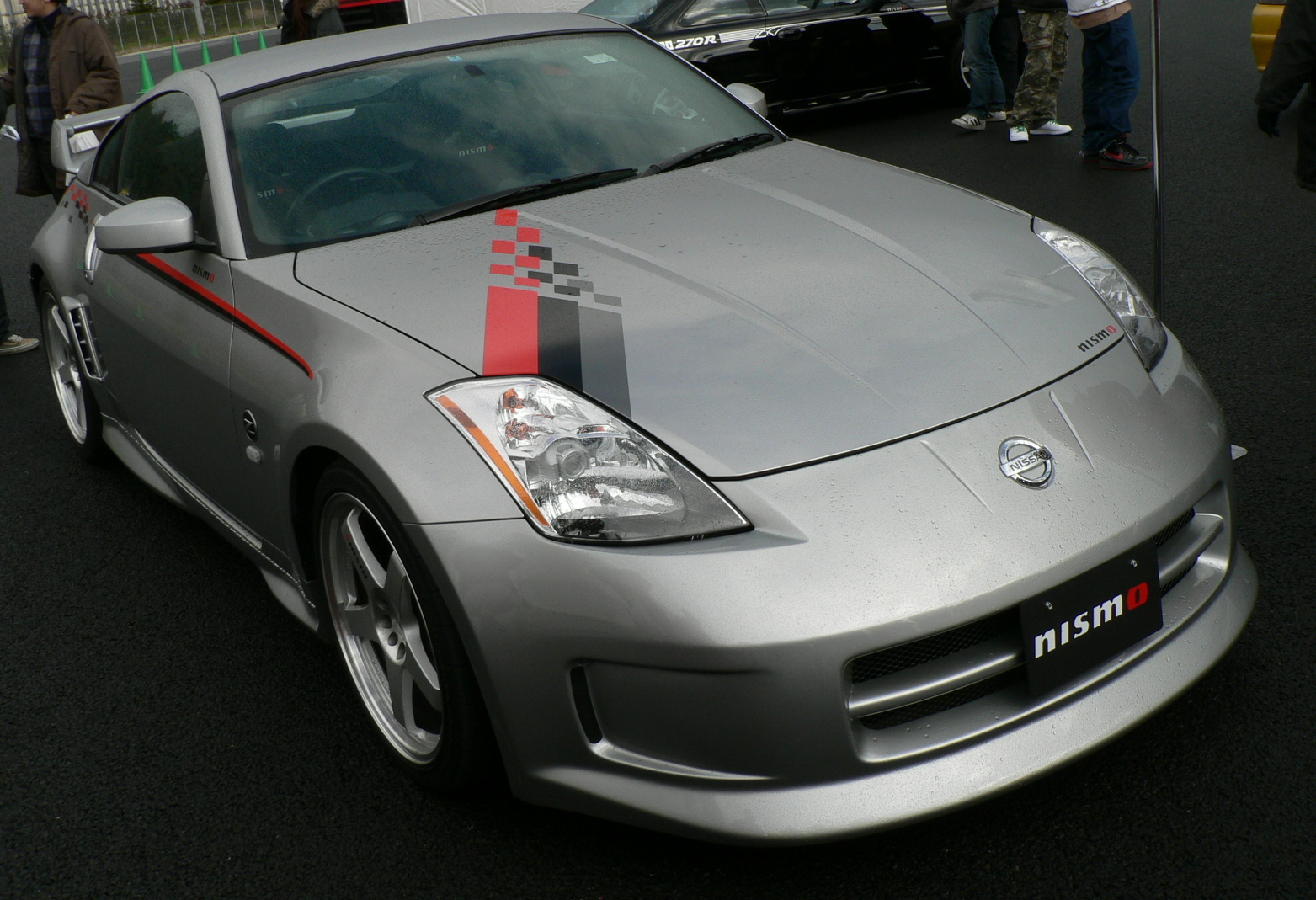 Z33 FAIRLADY Z S-tune GT NISMO FESTIVAL 2006